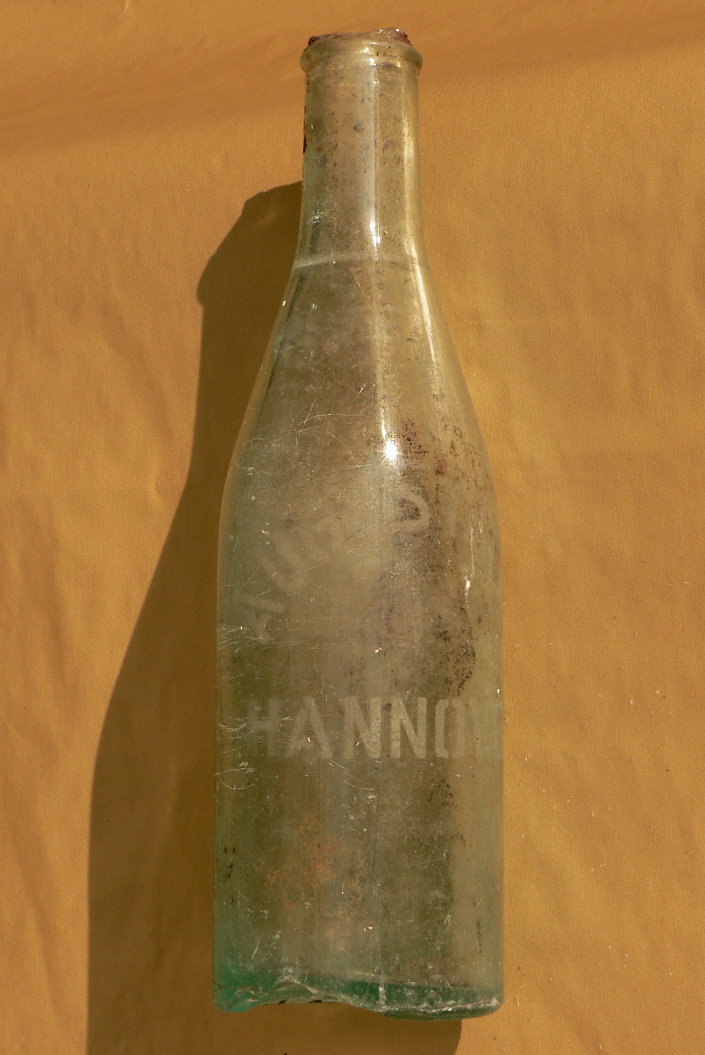 Wasserflasche mit schlecht lesbarer Aufschrift August Staude Hannover, gefunden in Hannover